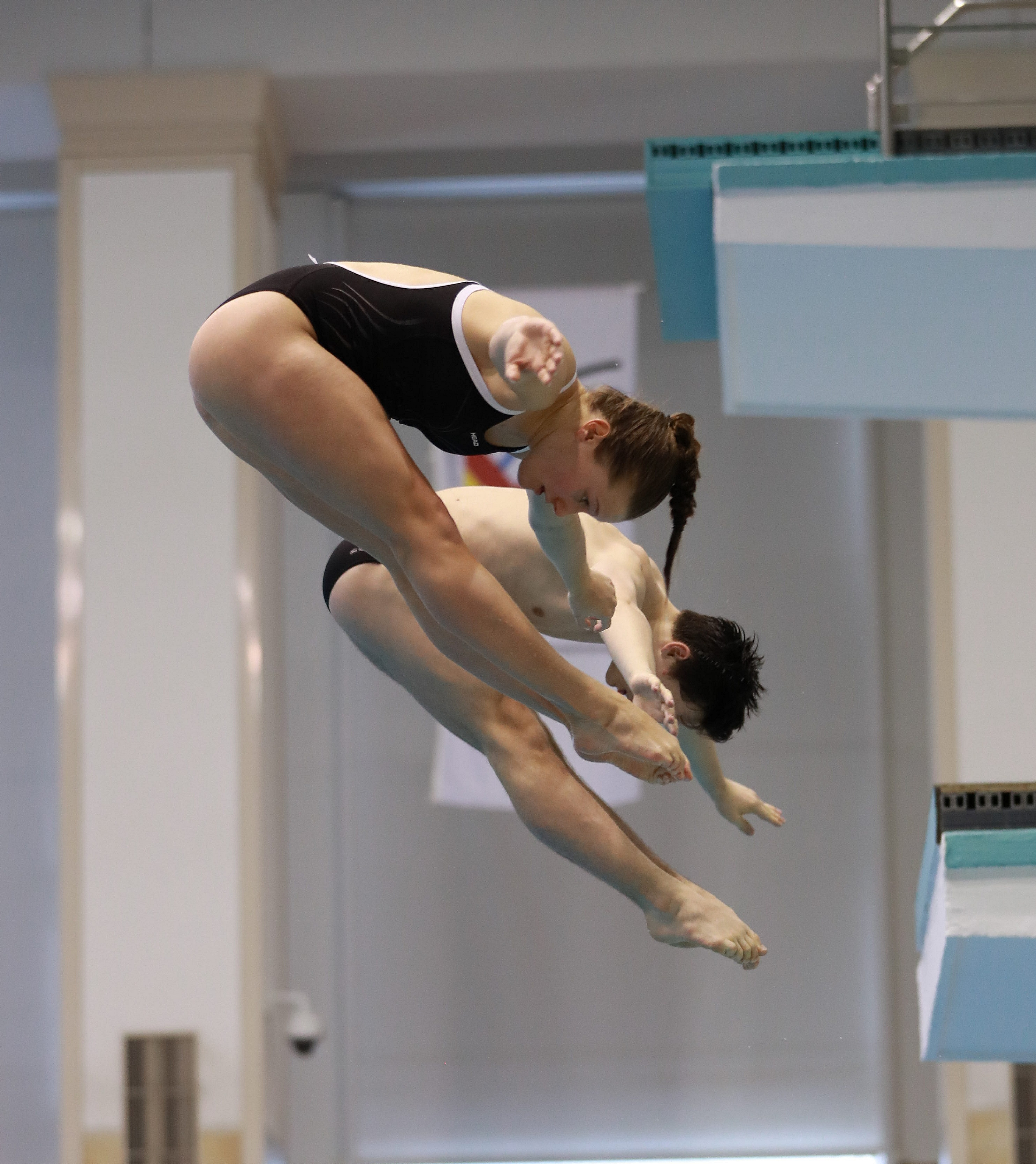 3m mixed Synchron Finale Sprung 1 bei den Internationalen Deutschen Hallenmeisterschaften im Wasserspringen Offene Klassen und Junioren. Abgebildet: Tina Punzel. Lou Massenberg.